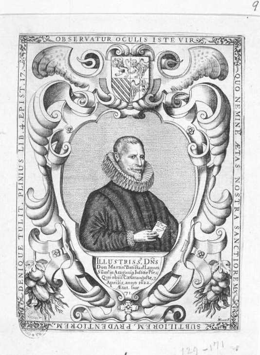 Retrato de Martín Batista de Lanuza, grabado calcográfico, 174 x 129 mm. Incorporado a El gran iusticia de Aragón, en Madrid, por Diego Díaz de la Carrera, 1650